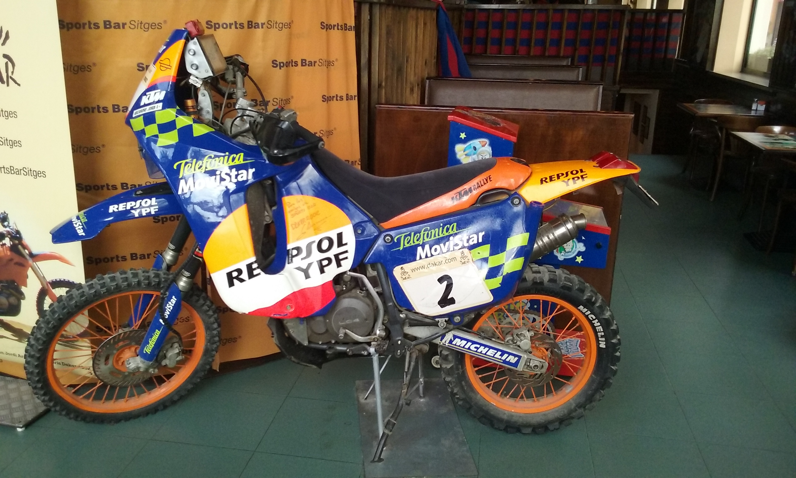 KTM de Jordi Arcarons al Rally Dakar 2002